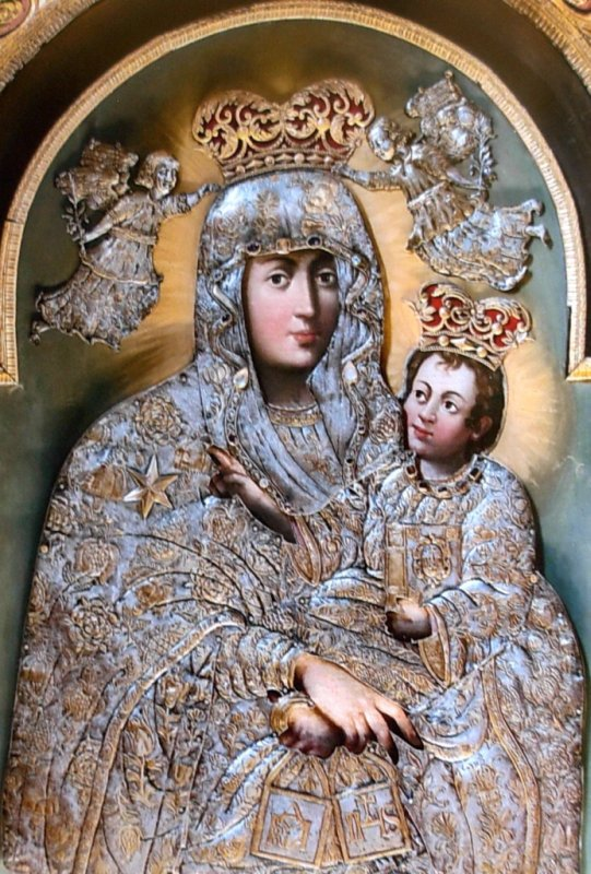 Obraz Matki Boskiej Szkaplerznej (ok. 1700 r.) z katedry. Pochodzi z kościoła Karmelitów w Bydgoszczy zburzonego w 1822 r.